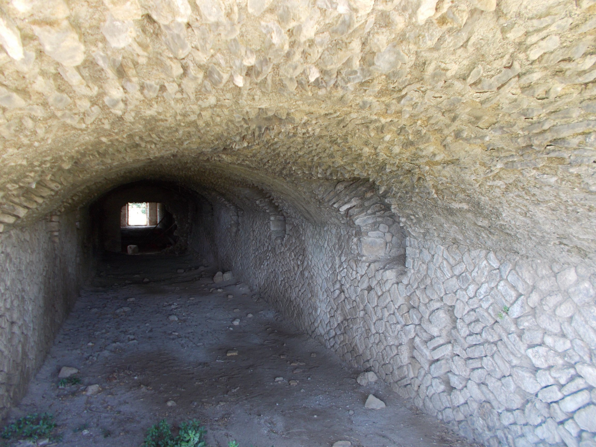 La Grotta di Torri, galleria voltata adiacente alle mura ciclopiche delle Grotte di Torri, sulle quali nell'Ottocento è stato elevato un casale